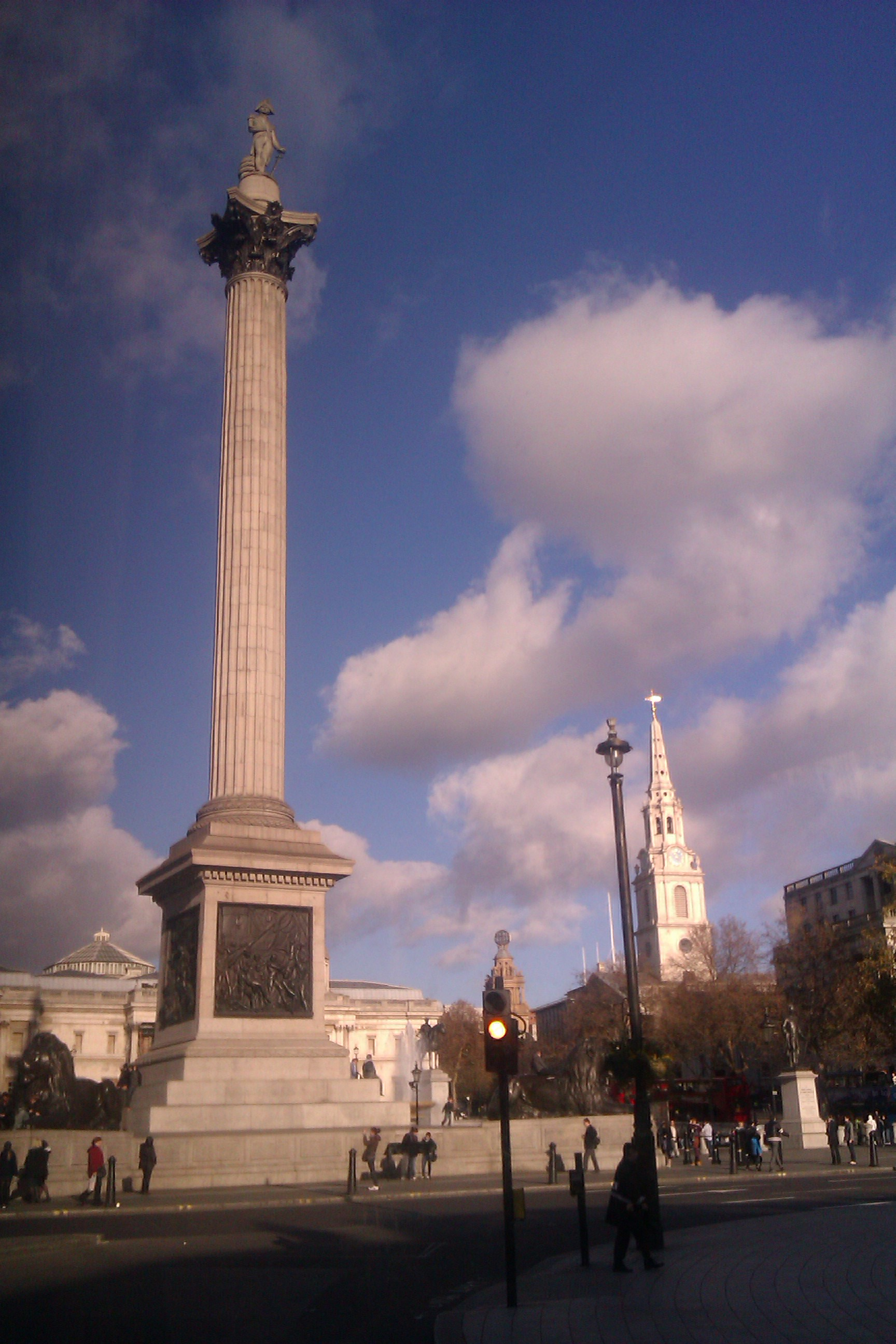 Trafalgare Square.